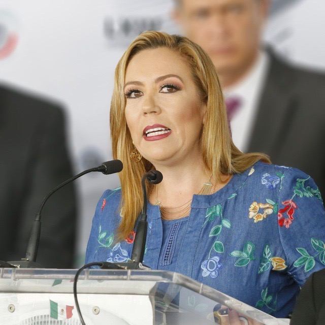 Senadora de la República por Guanajuato